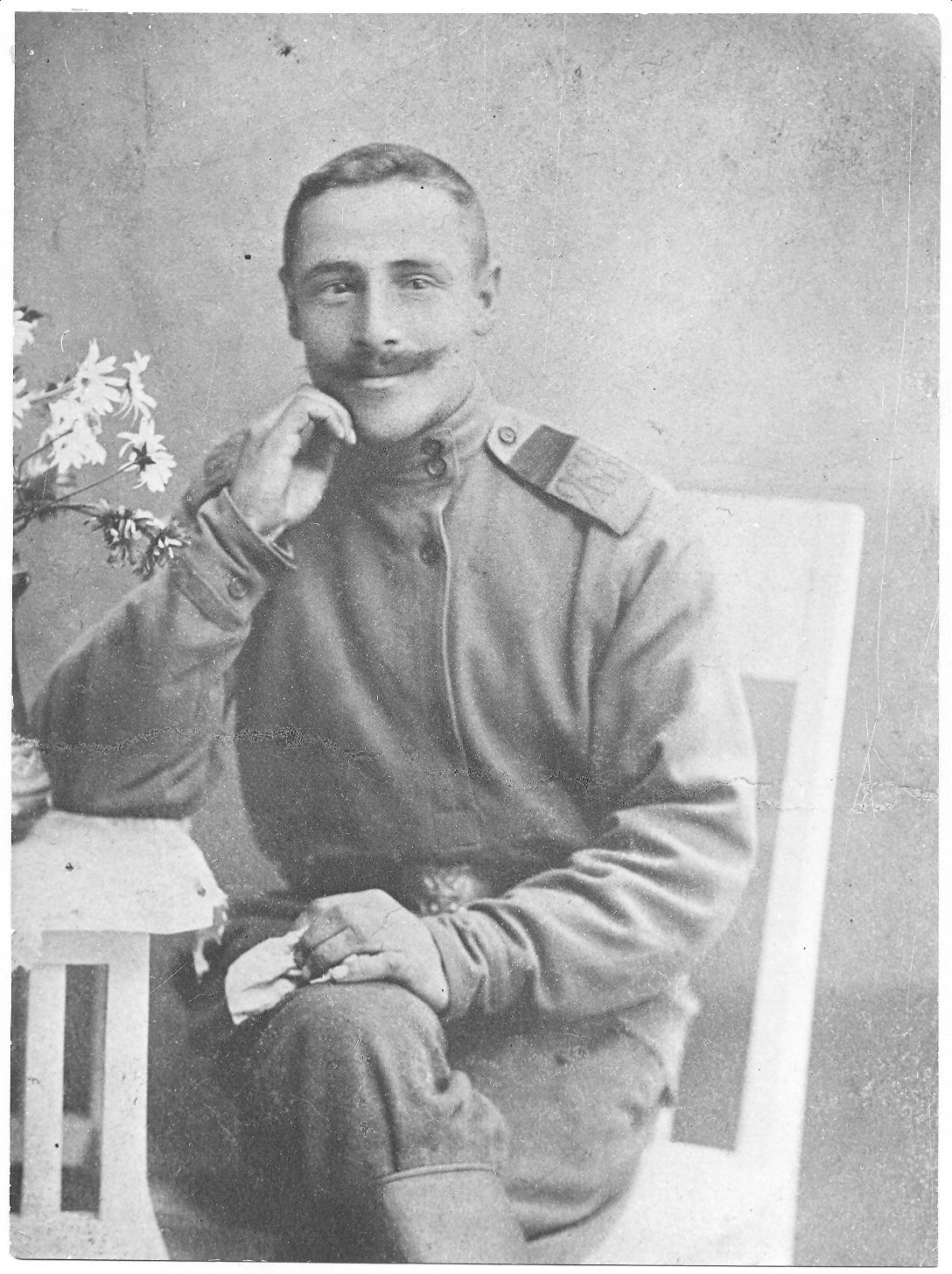 Фельдфебель 268-го Пошехонскго пехотного полка. Салов Яков Трофимович.